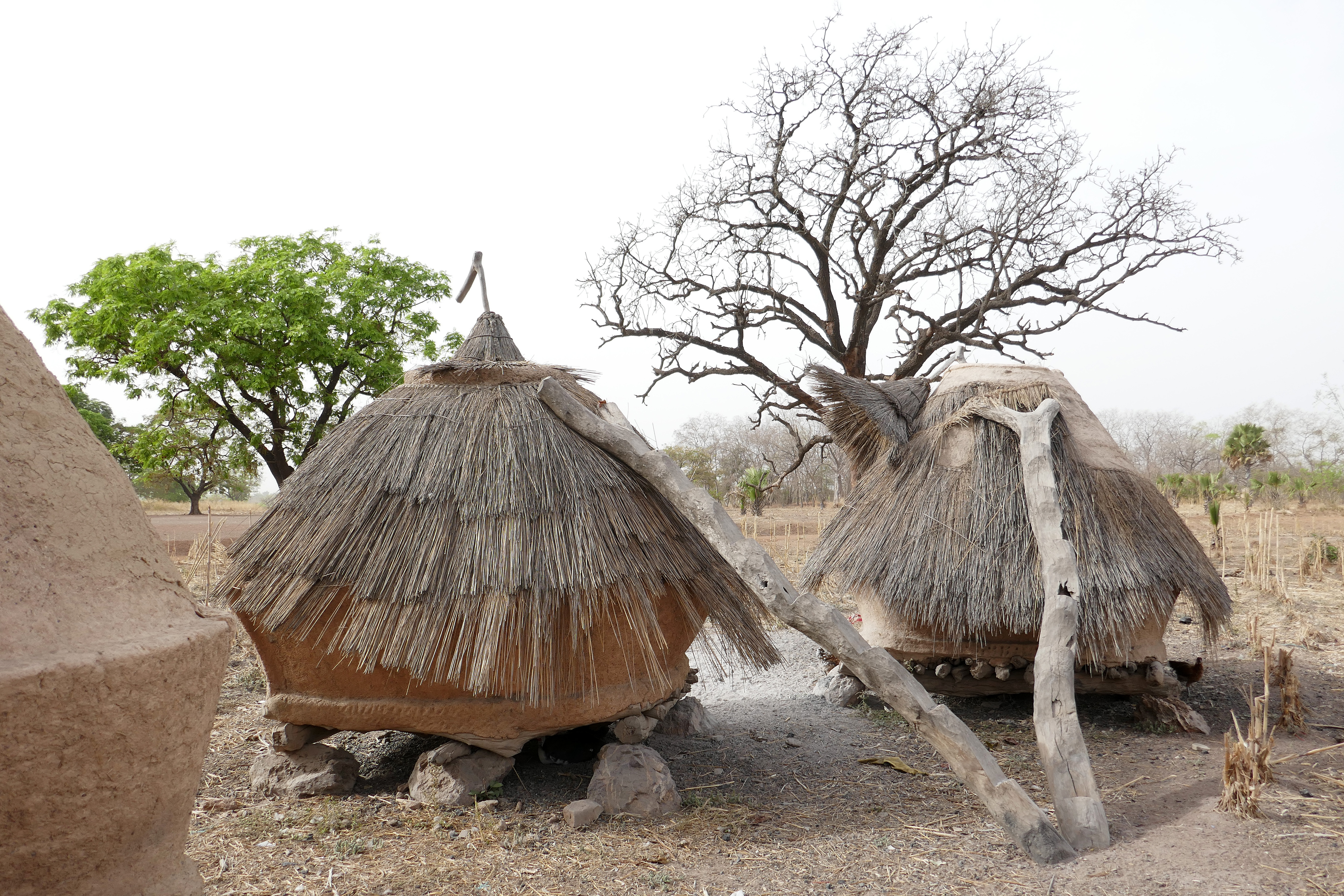 Greniers dans un village otammari au nord-ouest du Bénin (Manta, Boukoumbé).